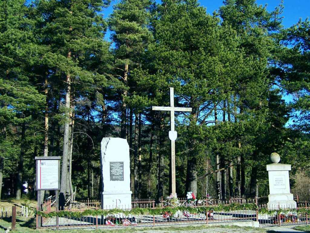 Pomnik Rydza -Śmigłego (Chyszówki, województwo małopolskie, gmina Dobra)